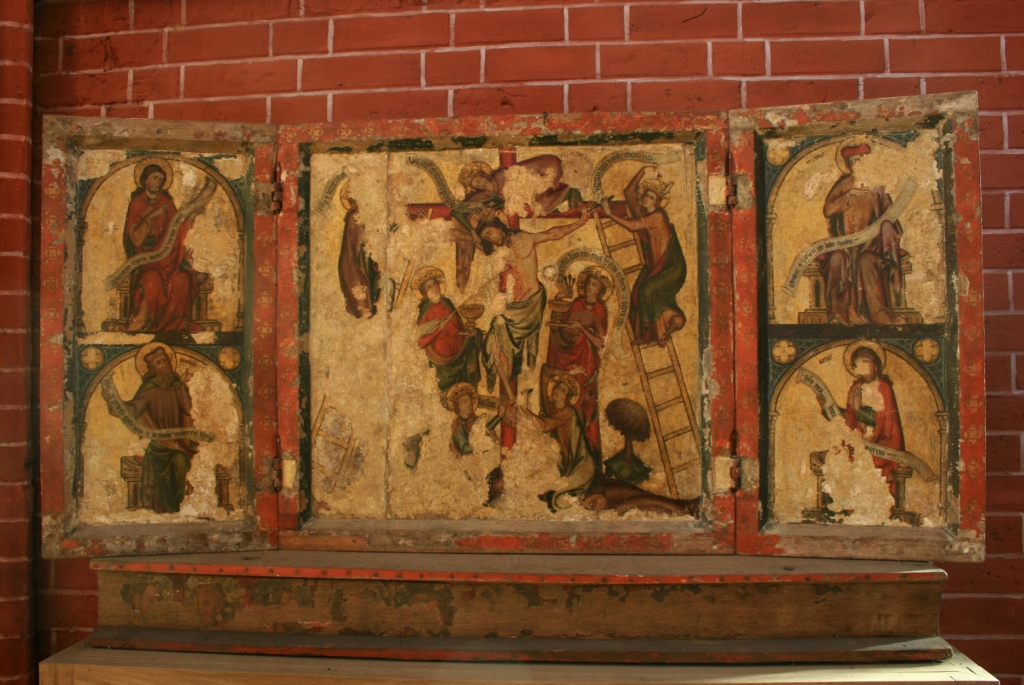 Altar der Kreuzigung durch die Tugenden im Doberaner Münster